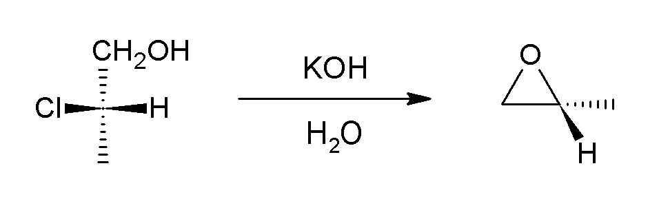 intramolecular epoxide formation